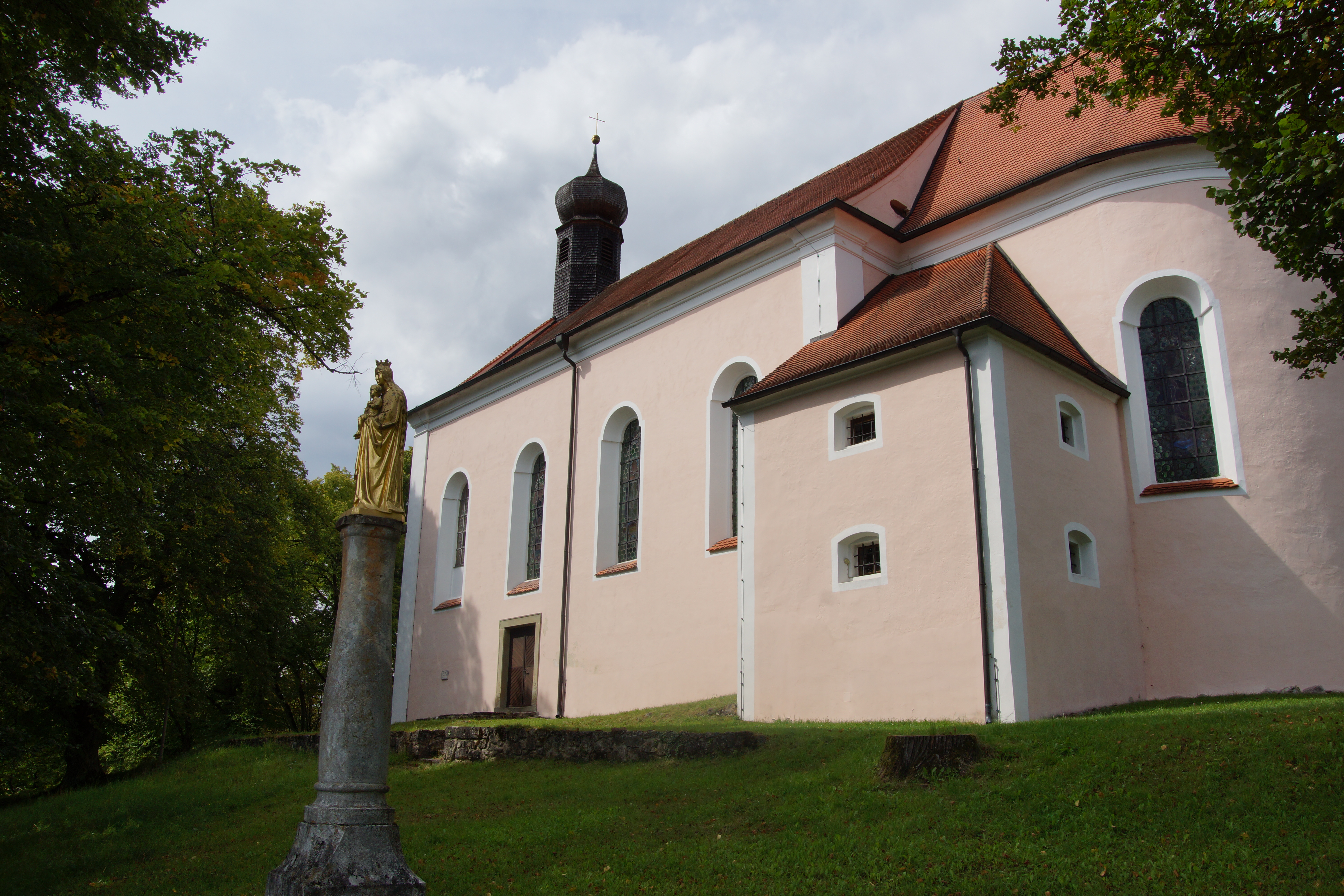 Die katholische Wallfahrtskirche Maria-Hilf im Oberpfälzischen Beratzhausen